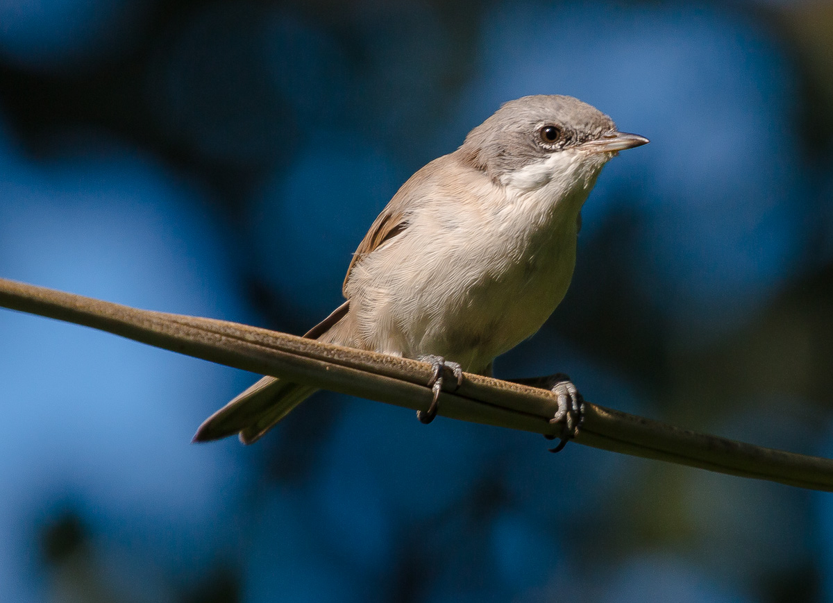 снято в Воронежской области